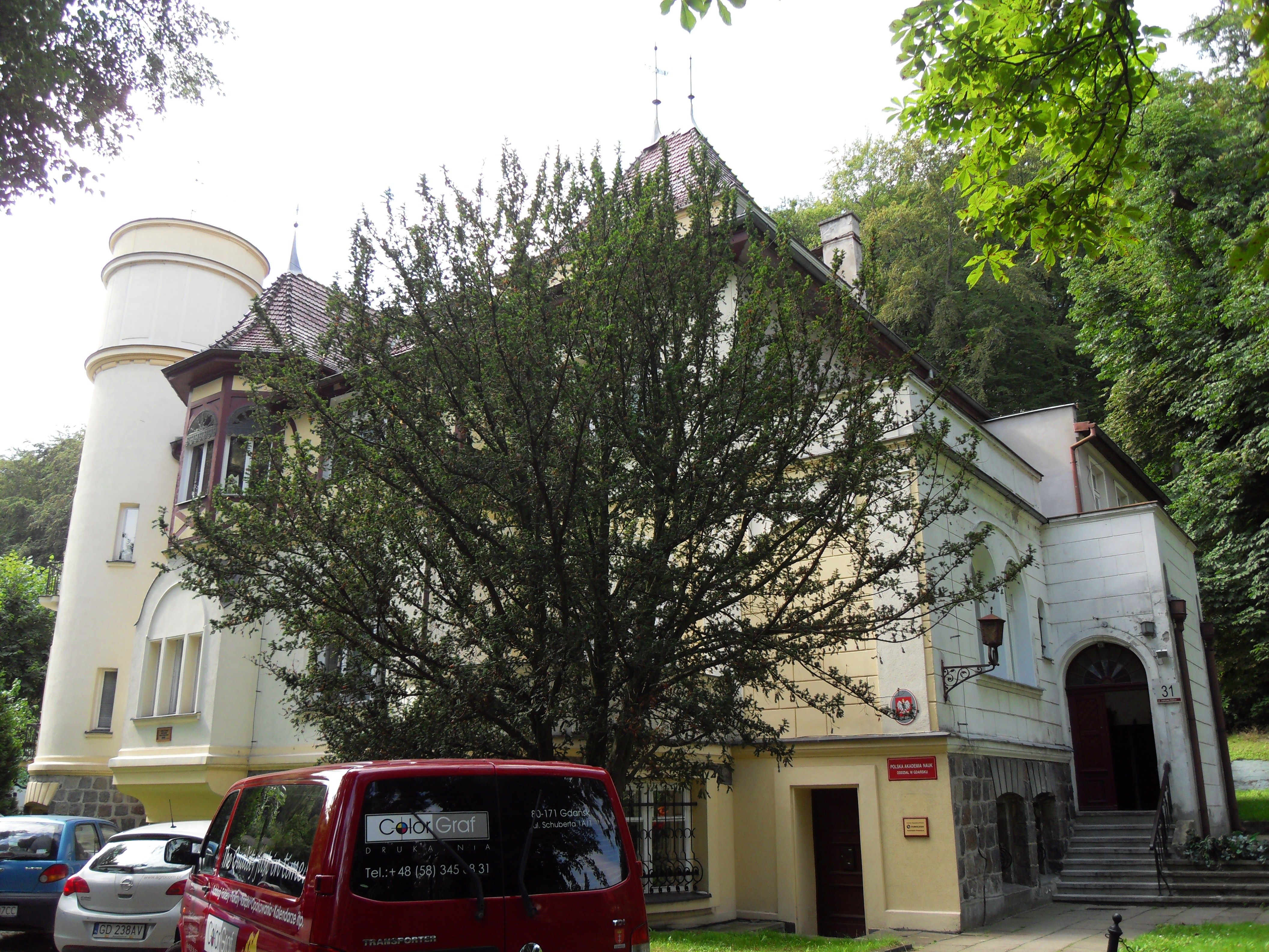 Gdańsk Wrzeszcz, ul. Jaśkowa Dolina 31. W tym budynku mieściło się m.in. serialowe "Radio Romans".